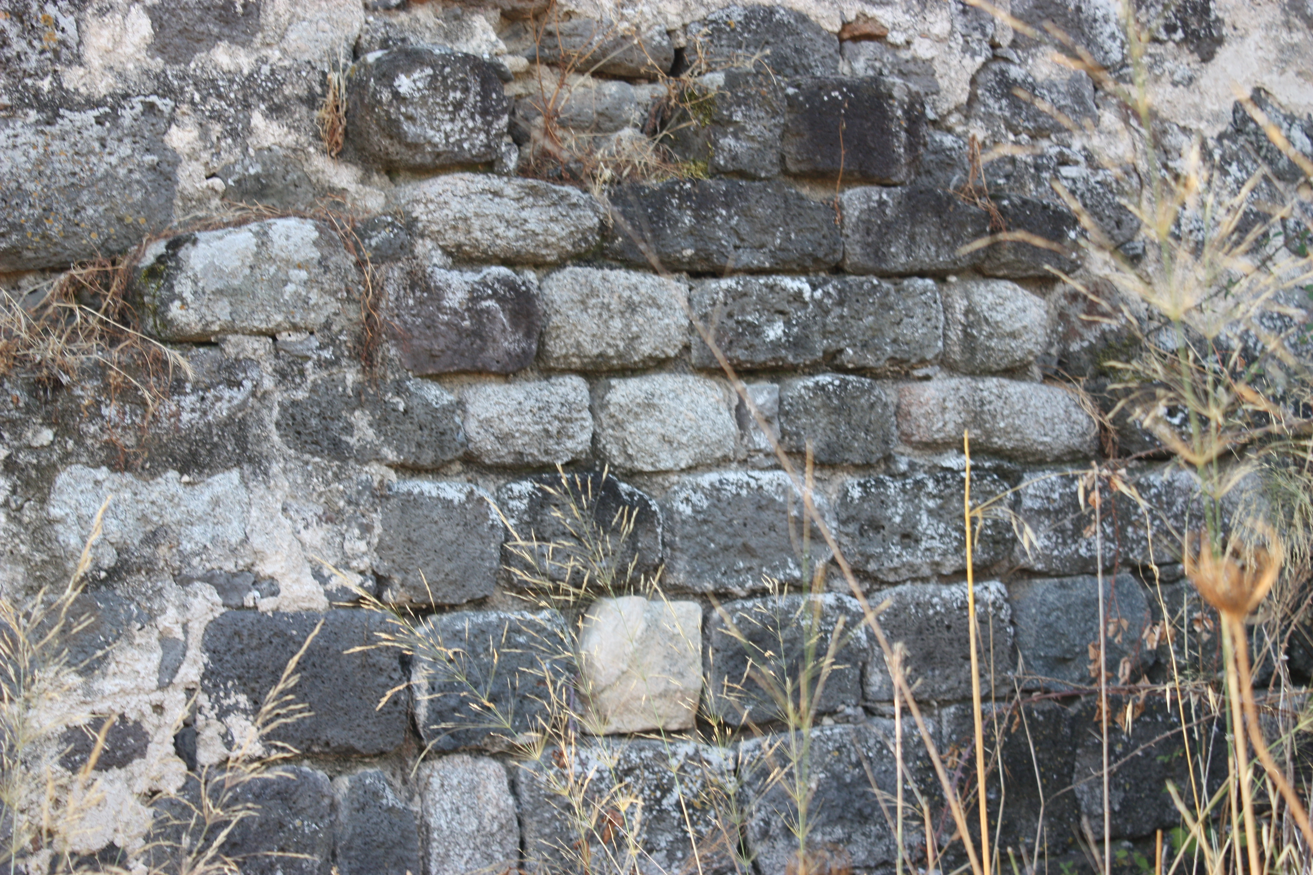 Girifai: resti dei muri del canonicato di San Pietro per Iloghe e per Biriddo (Sec.XIII).